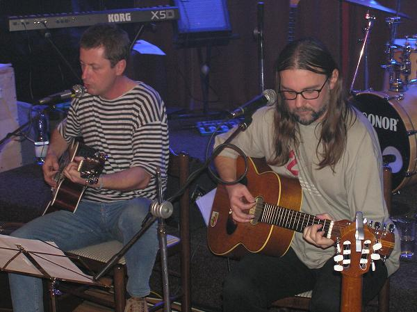 Démophobia, Strakonice, Hudební klub Křemelka; společný koncert s Navzájem